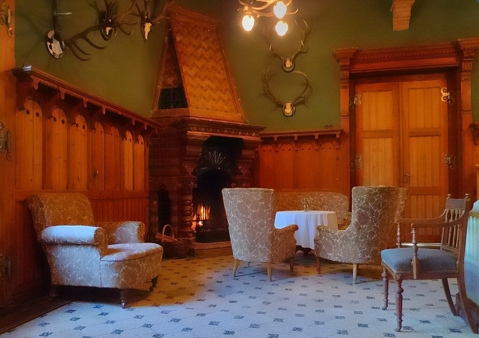 Jagd-Halle, Jagdschloss Gelbensande